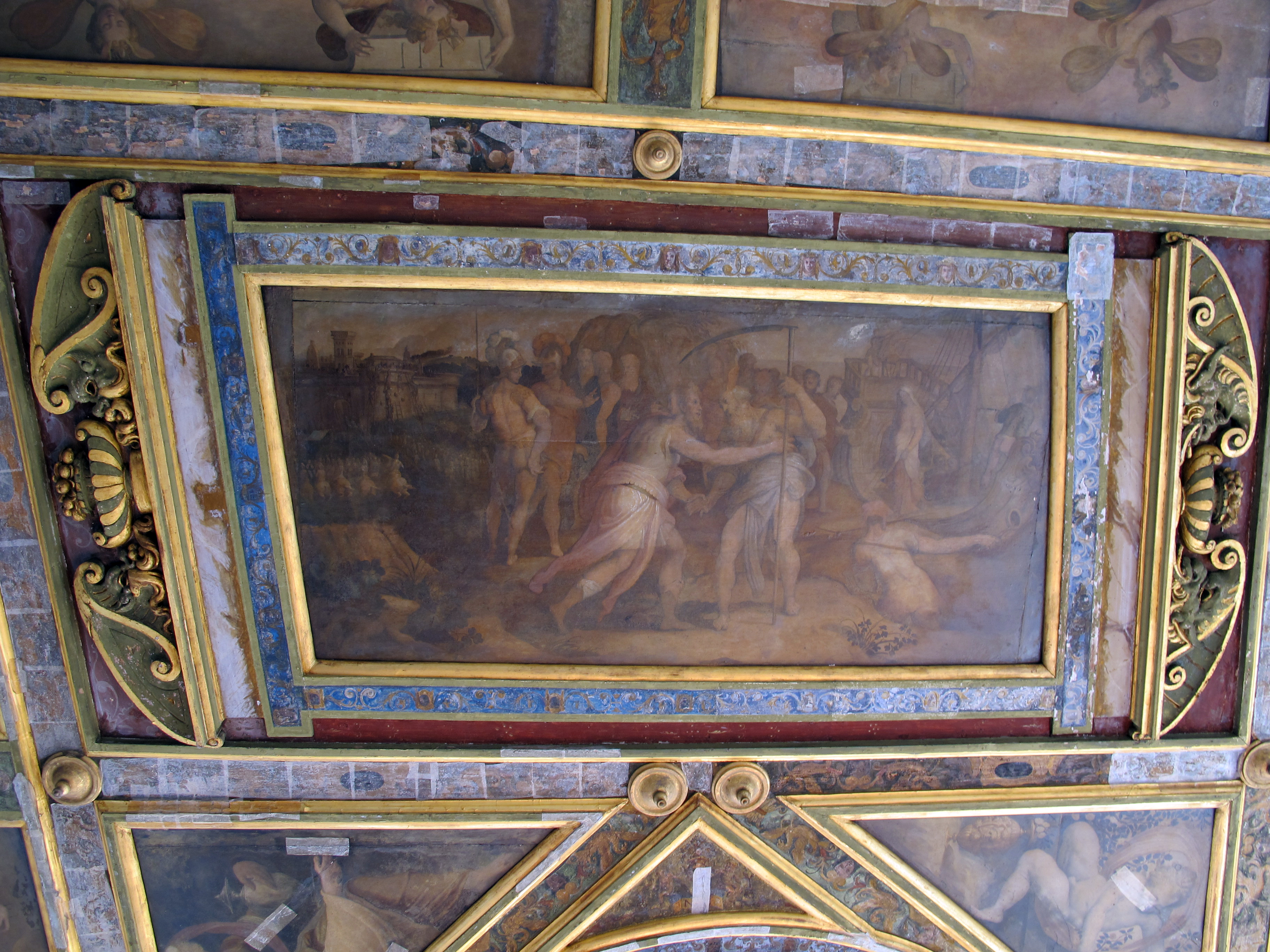 Palazzo Vecchio - Terrazza di Saturno